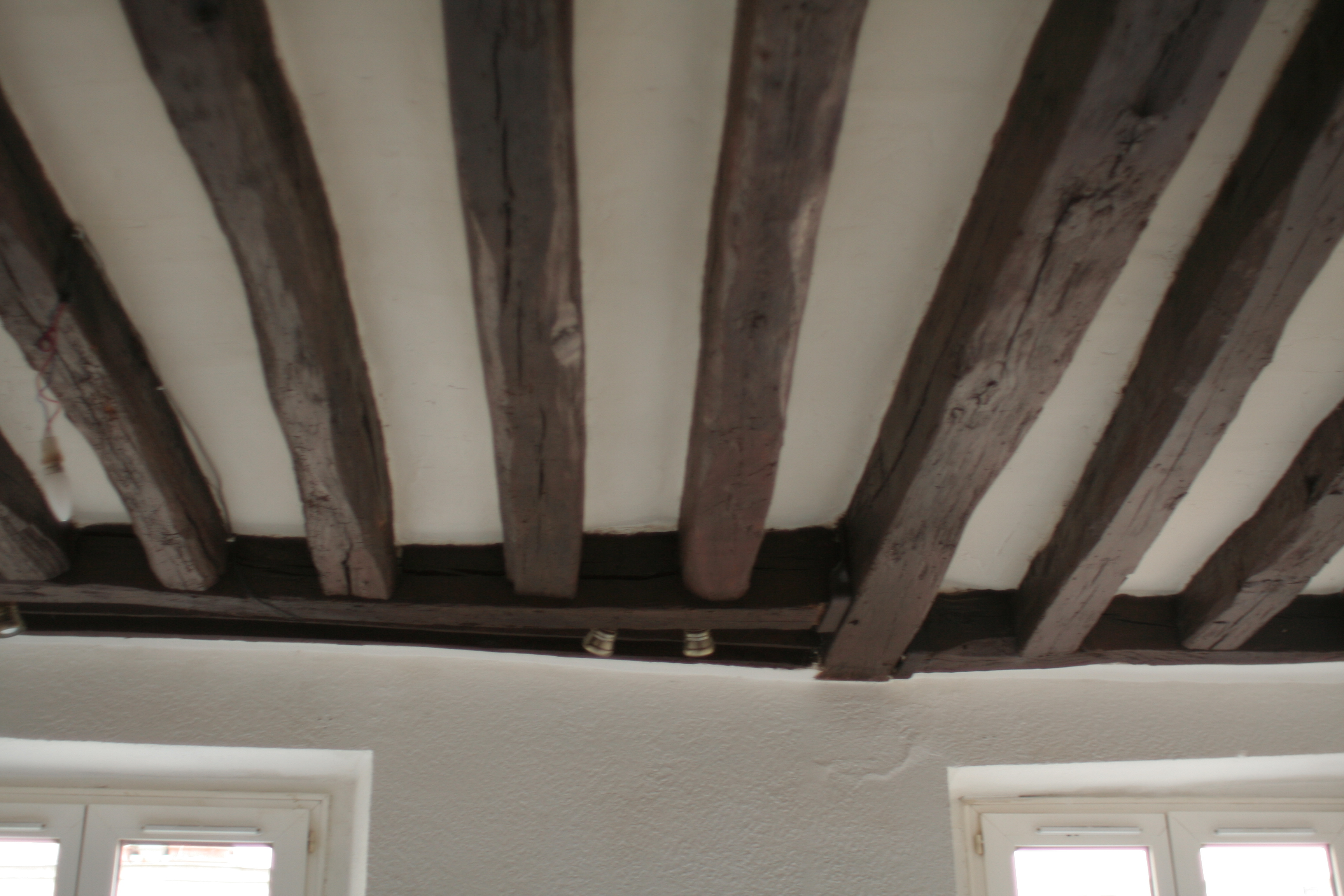 Solives (en chêne) portés par les linçoirs (le long du mur de face), lesquels linçoirs sont portés par la solive d'enchevêtrure.